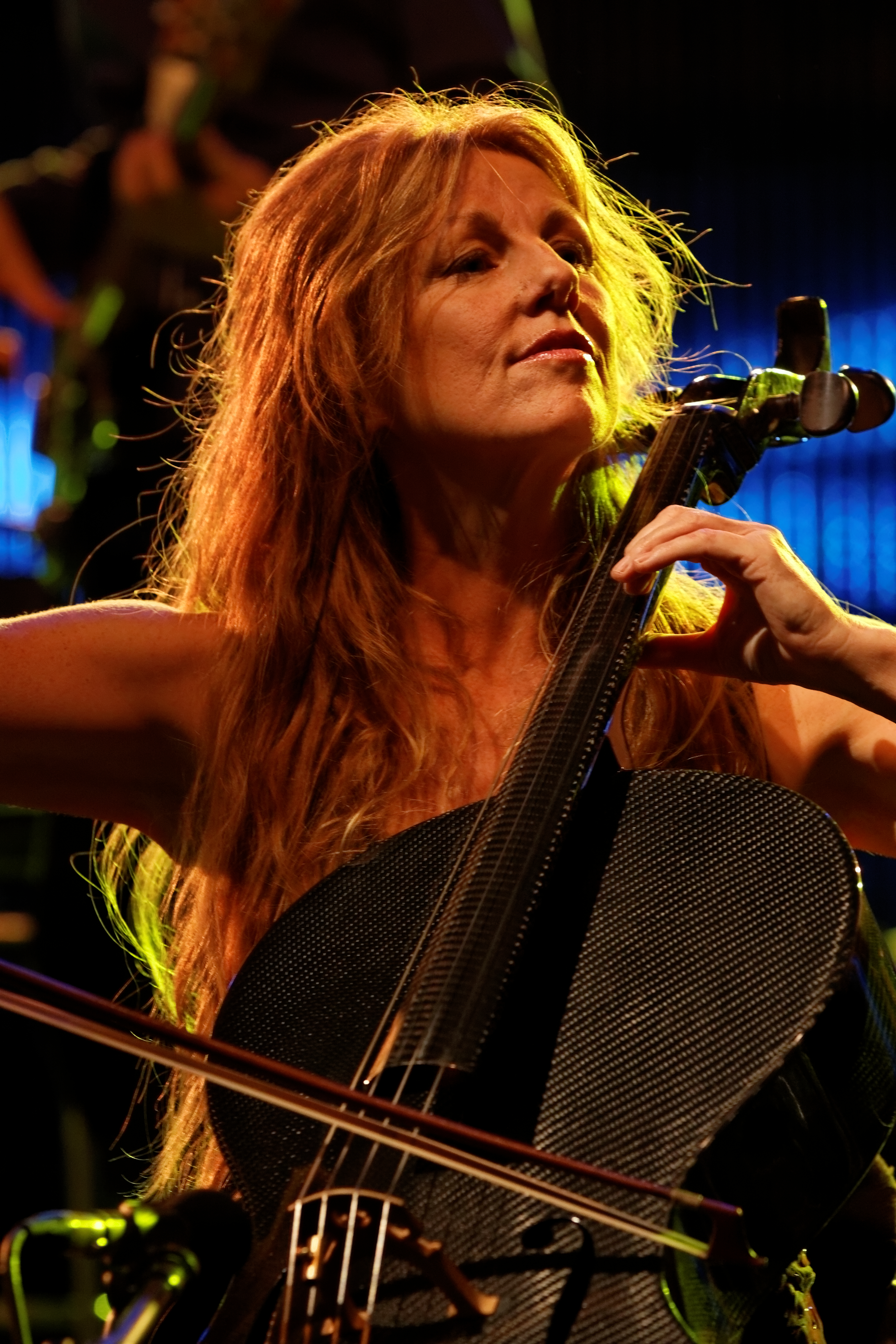 Loreena McKennitt en concert à l'espace Gradlon lors du festival de Cornouaille 2012.